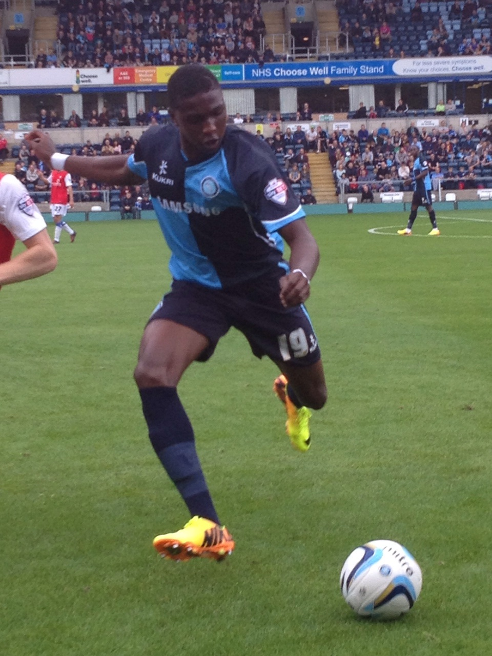 Kortney Hause